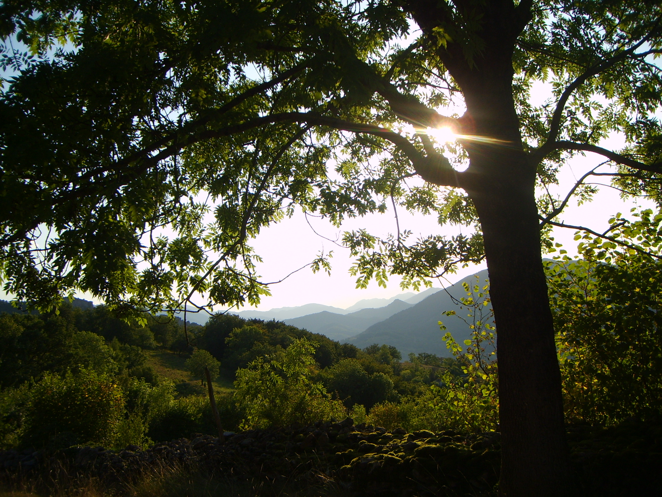 Saint-Girons, les sommets de la Bellongue vus depuis la Pale.